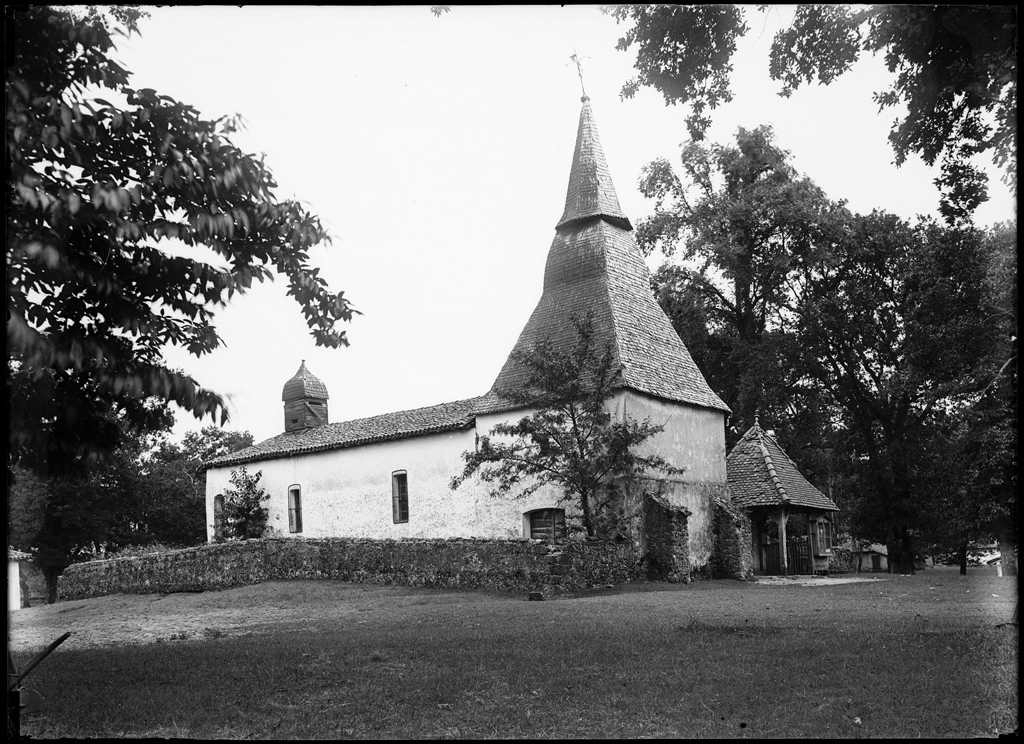 Reproduction numérique de l'œuvre Église de Bias, réalisée par Félix Arnaudin à Bias le 09 juillet 1897 selon la technique du gélatino bromure d'argent sur plaque de verre (13 x 18 cm)